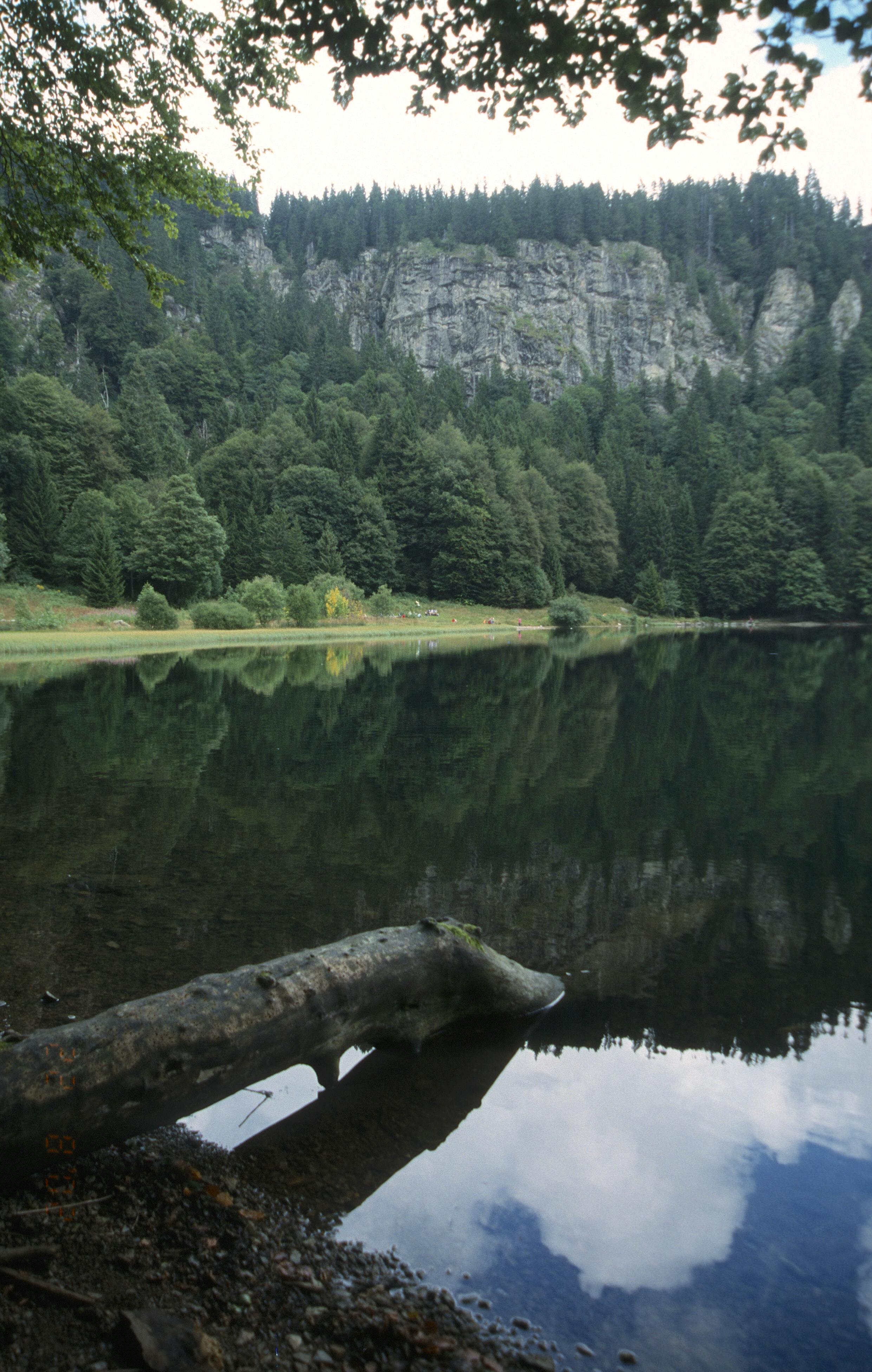 Feldsee